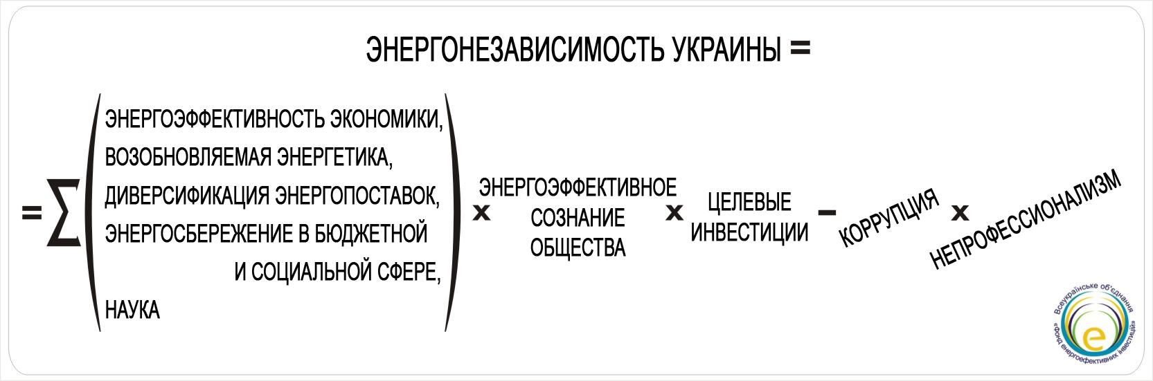 формула энергоэффективности, разработанная Черкашиным Игорем Юрьевичем